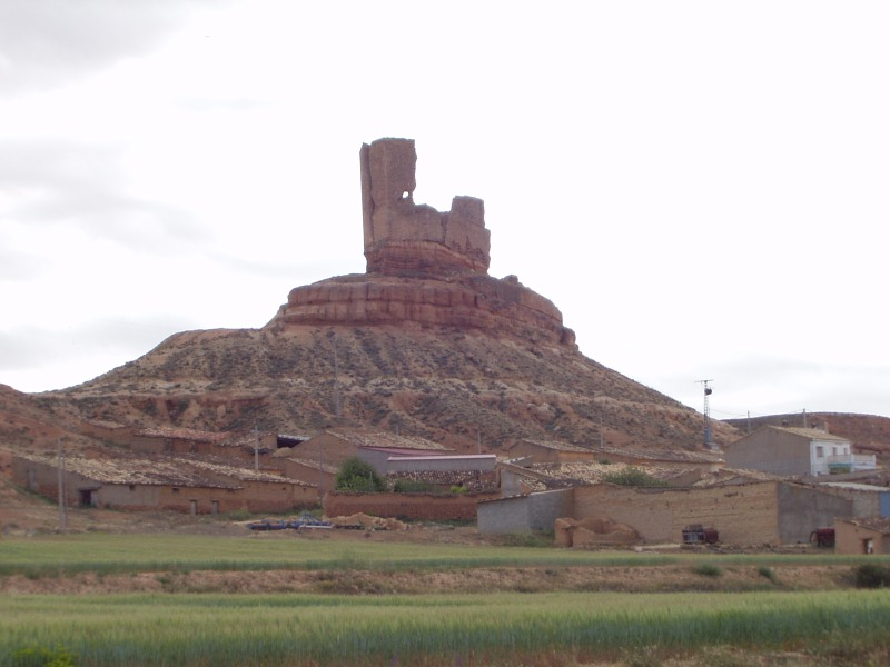 Castillo de Montuenga (Soria)